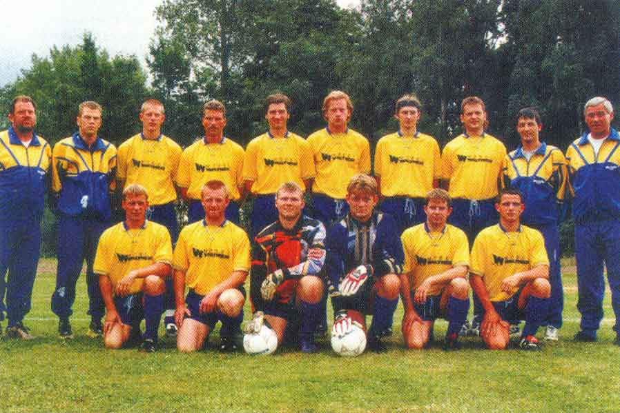 Mannschaftsbild hinten von links: Roland Seuß, Dennis Gottschald, Ben Sommer, Andreas Raß, Ingo Schroth, Nico Nagel, Andreas Haufe, Uwe Schladitz, Knut Kamann, Henning Frenzel, vorn von links: Jörg Bertram, Marco Haferburg, Andre Reiser, Sebastian Holodziuk, Uwe Bertram, Steven Craatz